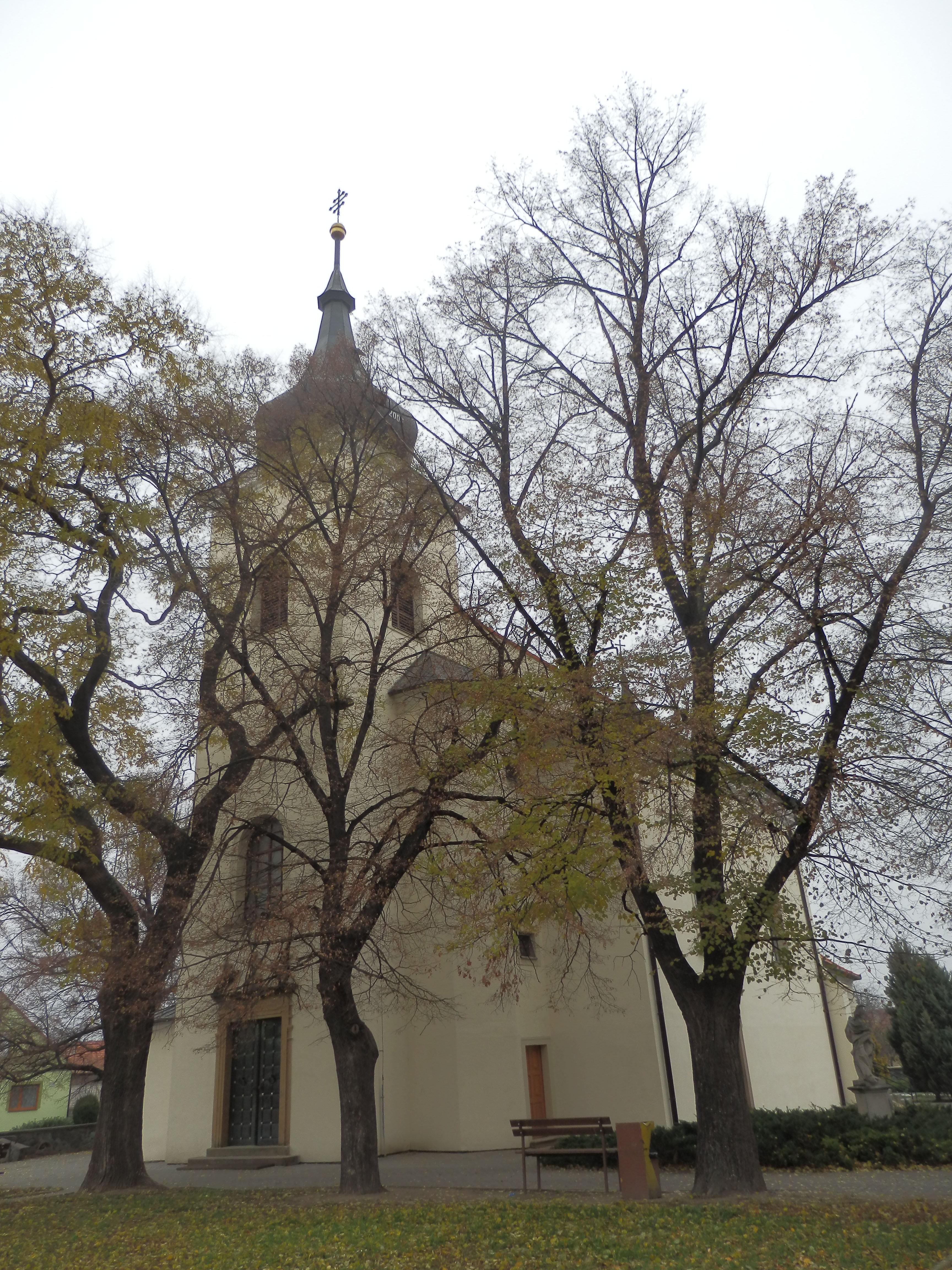 Kostel sv. Václava a sv. Víta (Velké Němčice), Velké Němčice